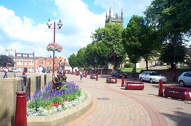 Market Square, Ilkeston, Derbyshire